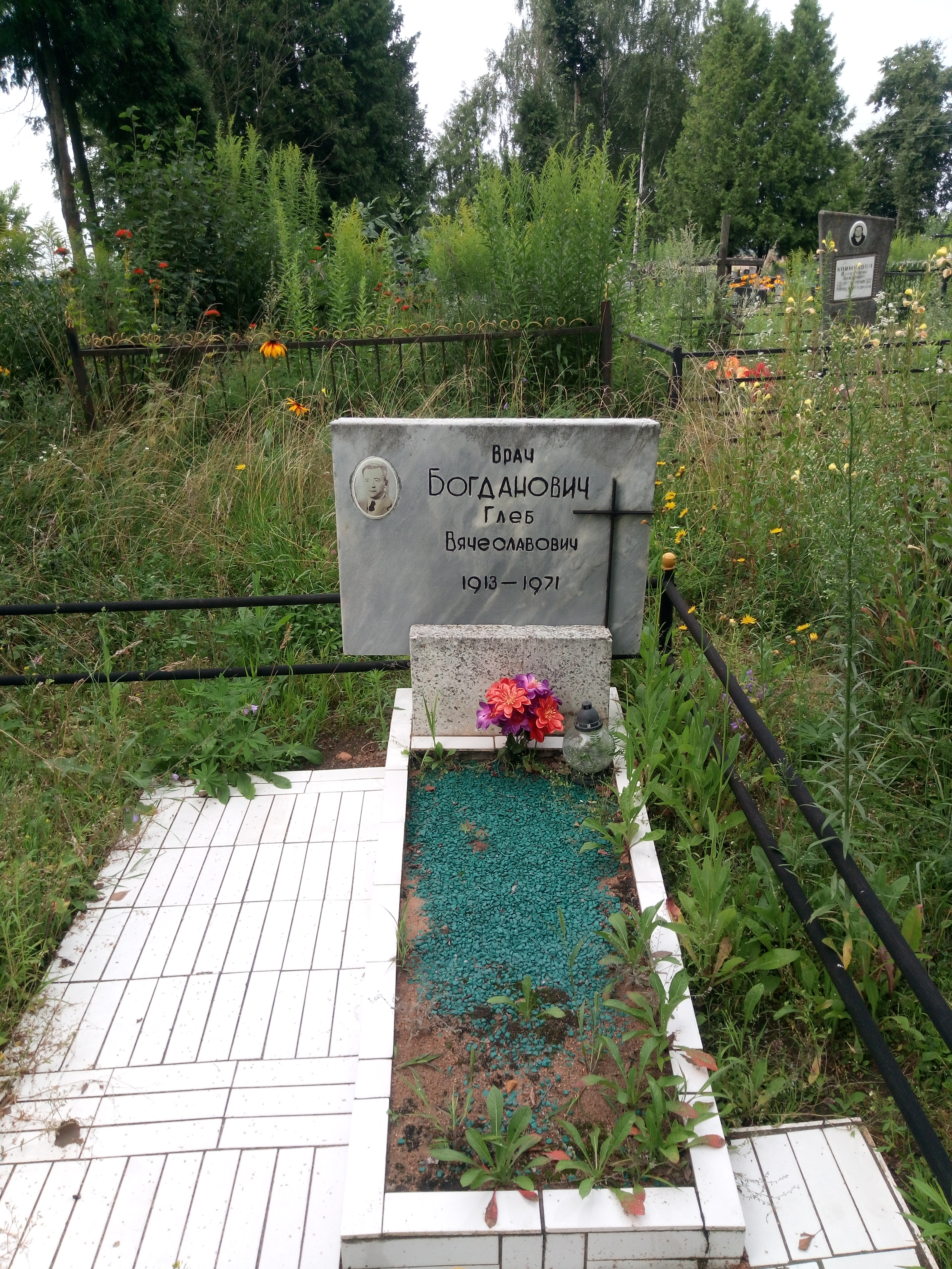 Магіла Глеба Багдановіча